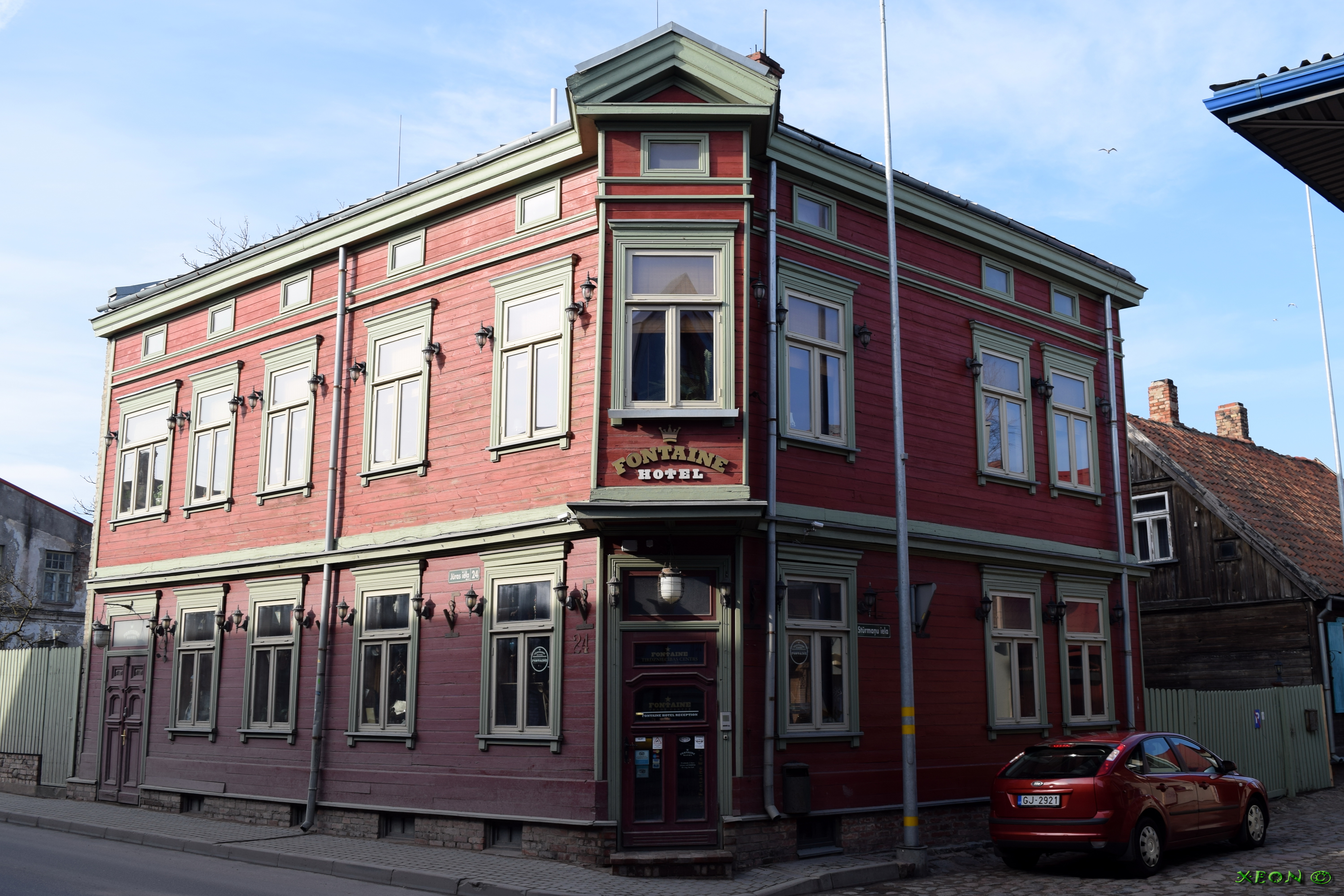 Hotel Fontaine Jūras ielā 24